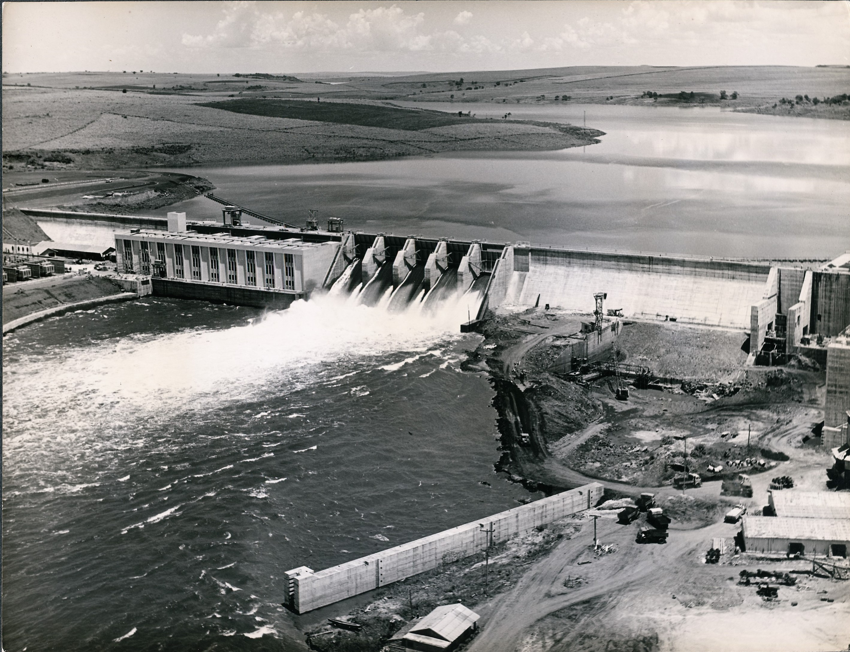 Fotografia do Fundo Correio da Manhã, sob a guarda do Arquivo Nacional.